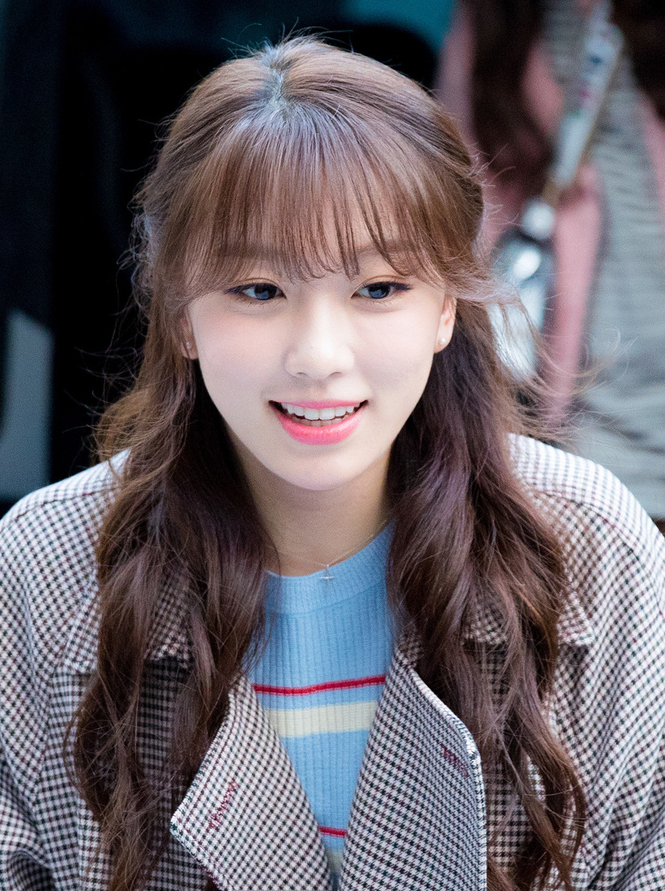 [18.02.23] 뮤직뱅크 직찍 ( 더유닛 UnitG 우희 앤씨아 이수지 지엔 의진 달샤벳 라붐 소나무 )